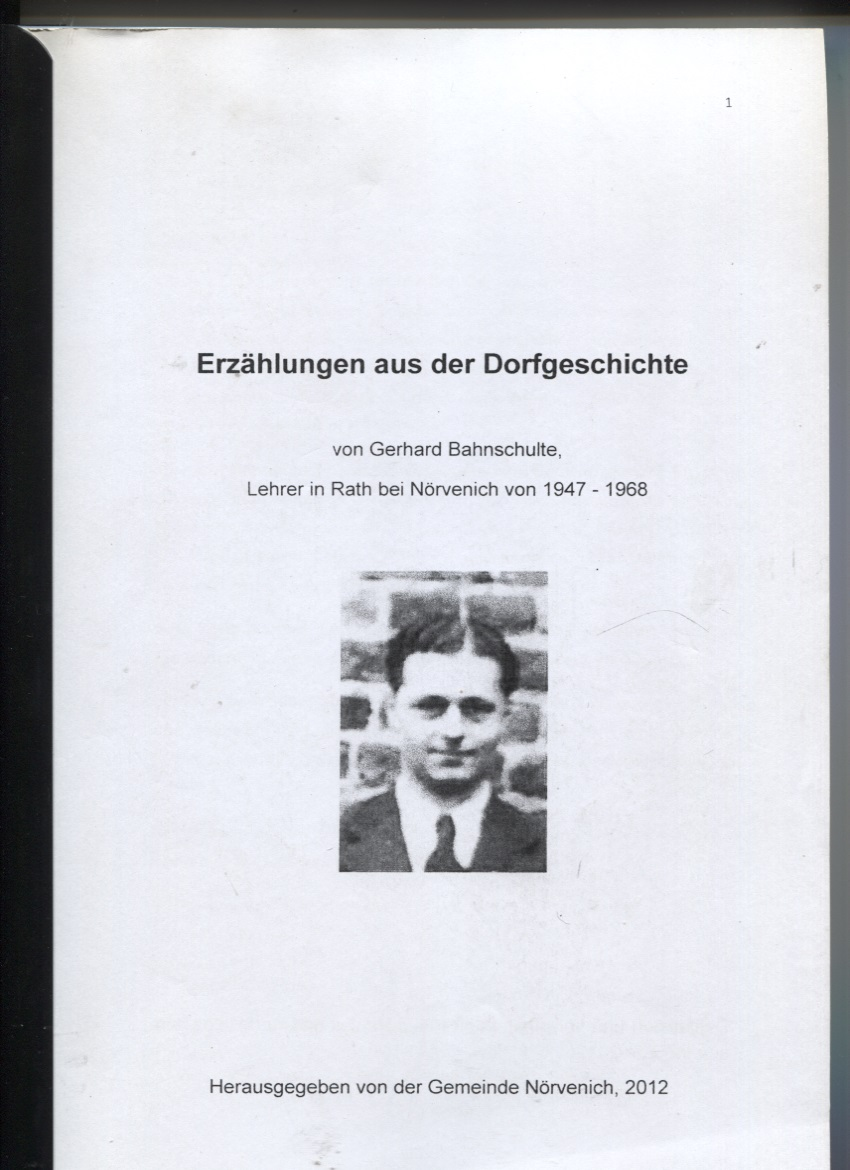 Deckblatt zum Heft